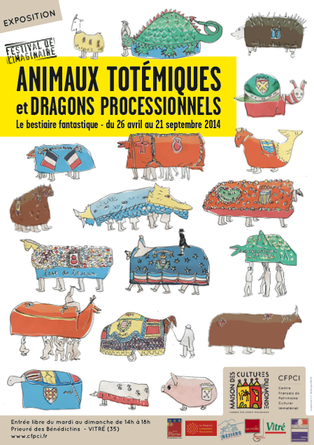 Affiche de l'exposition Animaux totémiques et dragons processionnels, du 26 avril au 21 septembre 2014, au Centre français du patrimoine culturel immatériel